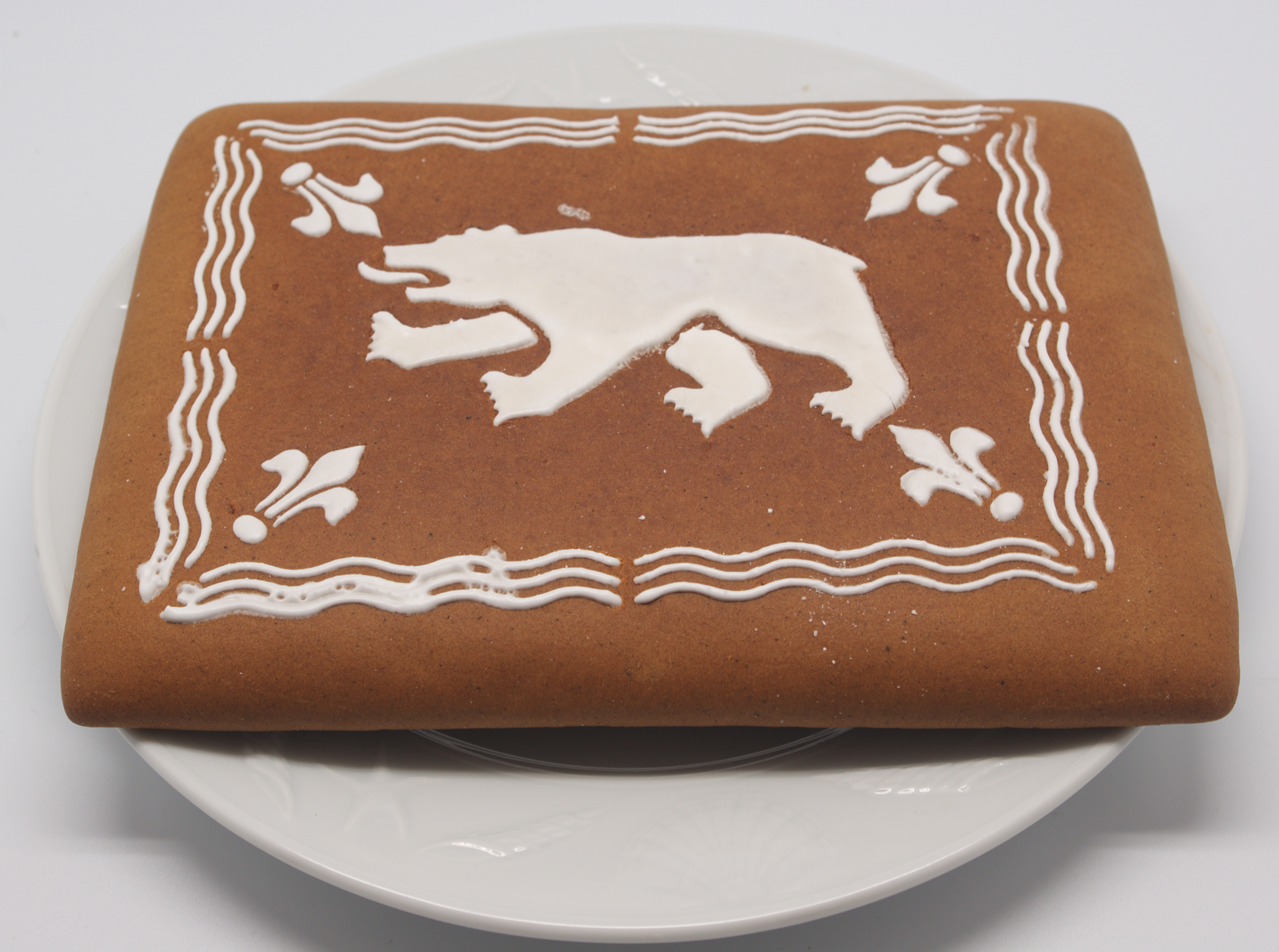 Biscôme avec glaçage en forme d'ours